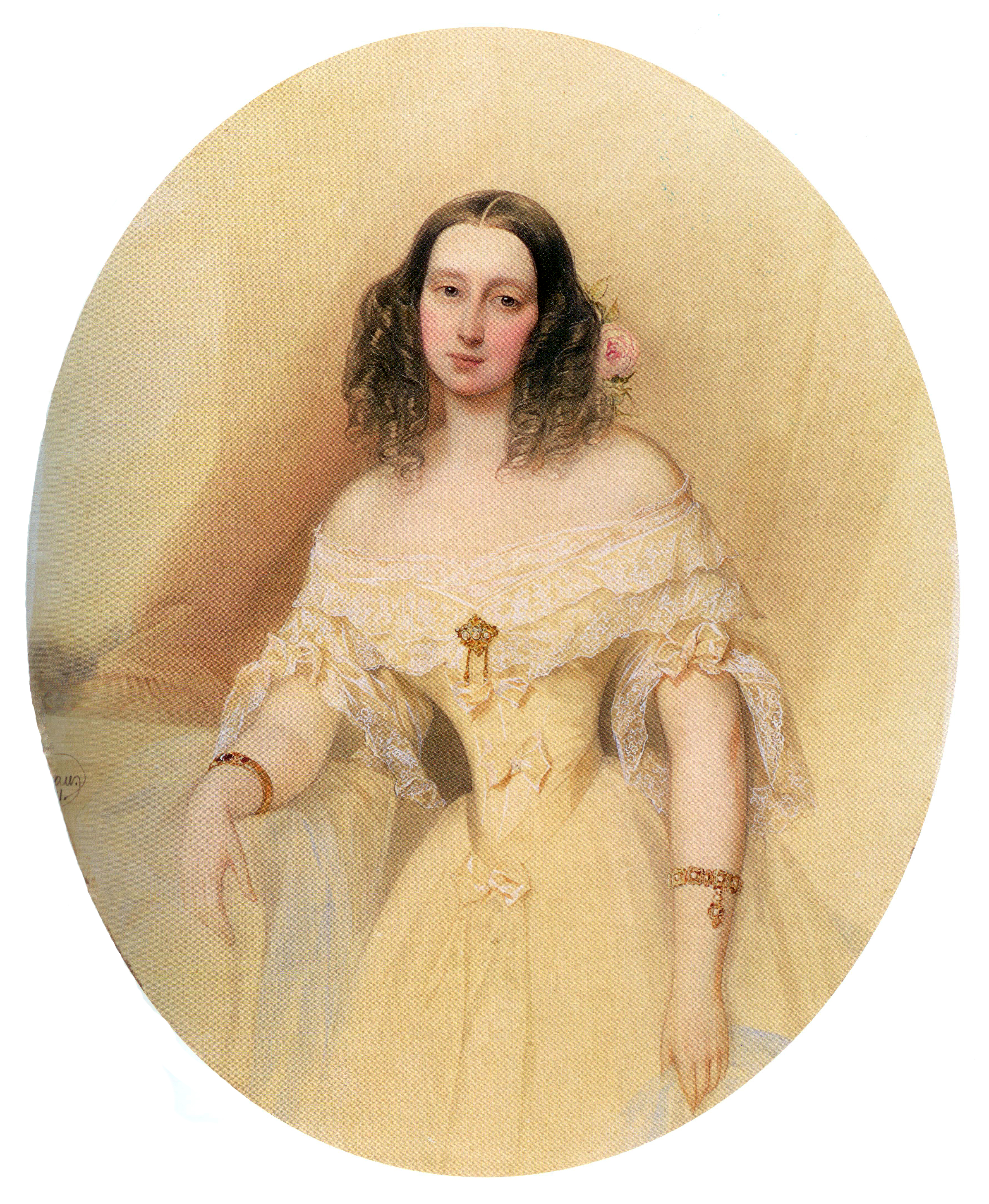 Евдокия Андреевна Рихтер, ур. Пашкова (13.04.1821—23.09.1894), замужем за генералом Александром Борисовичем Рихтером.